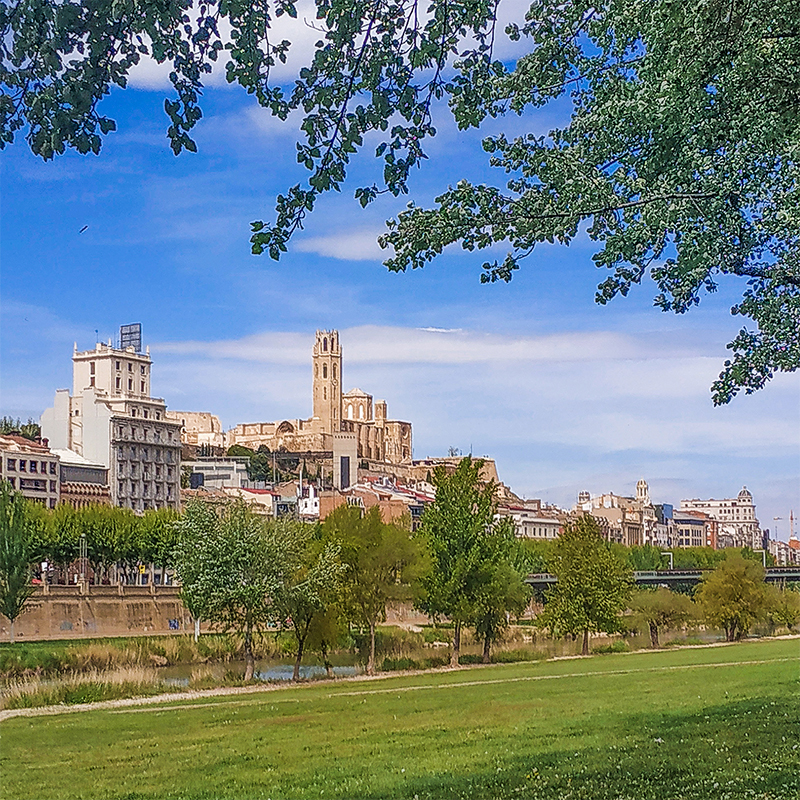 Vista de Lérida desde el río, en Cataluña, España